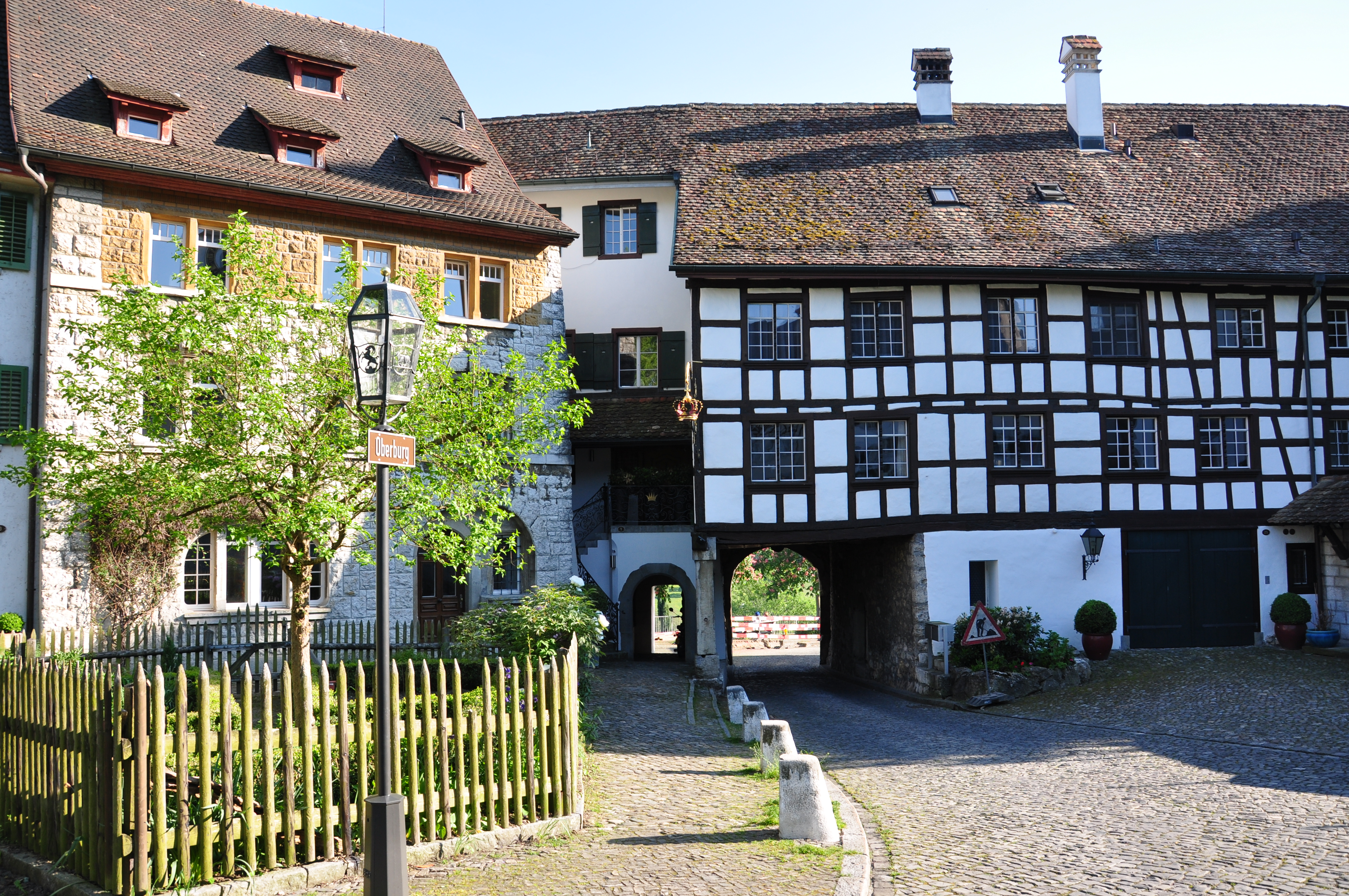 Oberburg in Regensberg (Switzerland)